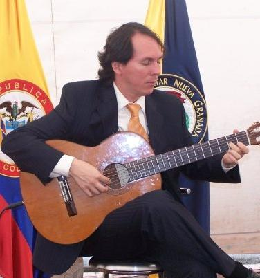 Foto de Julián Rodríguez en la Universidad Militar Nueva Granada